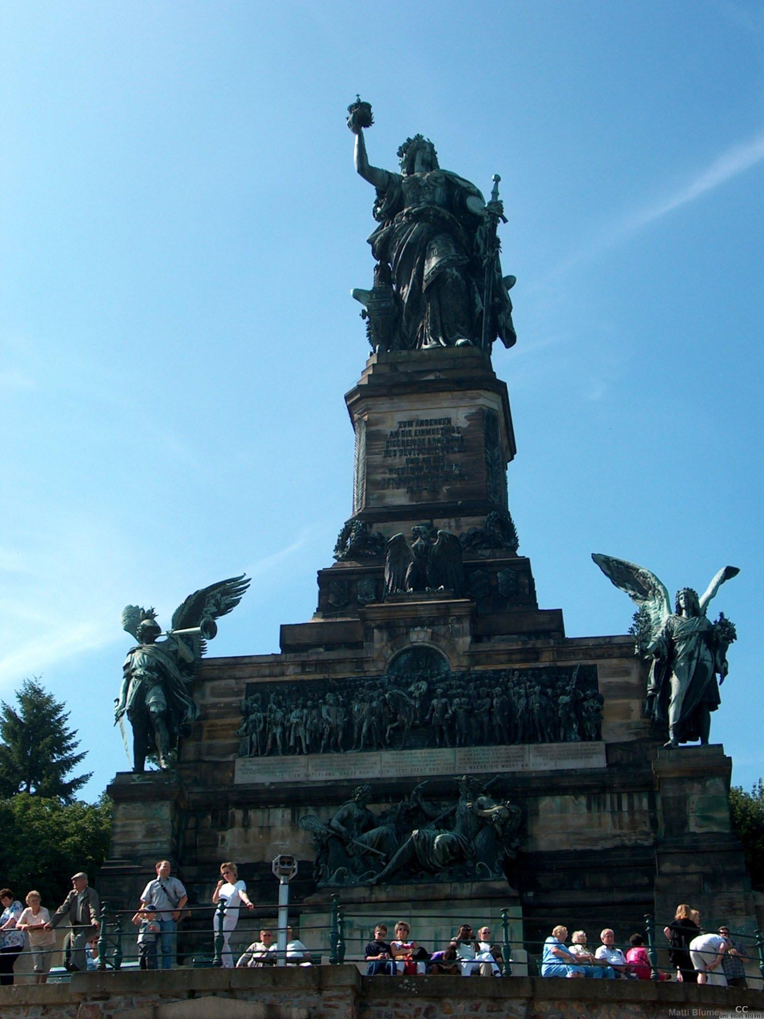 Niederwald Memorial Rüdesheim/Rhine